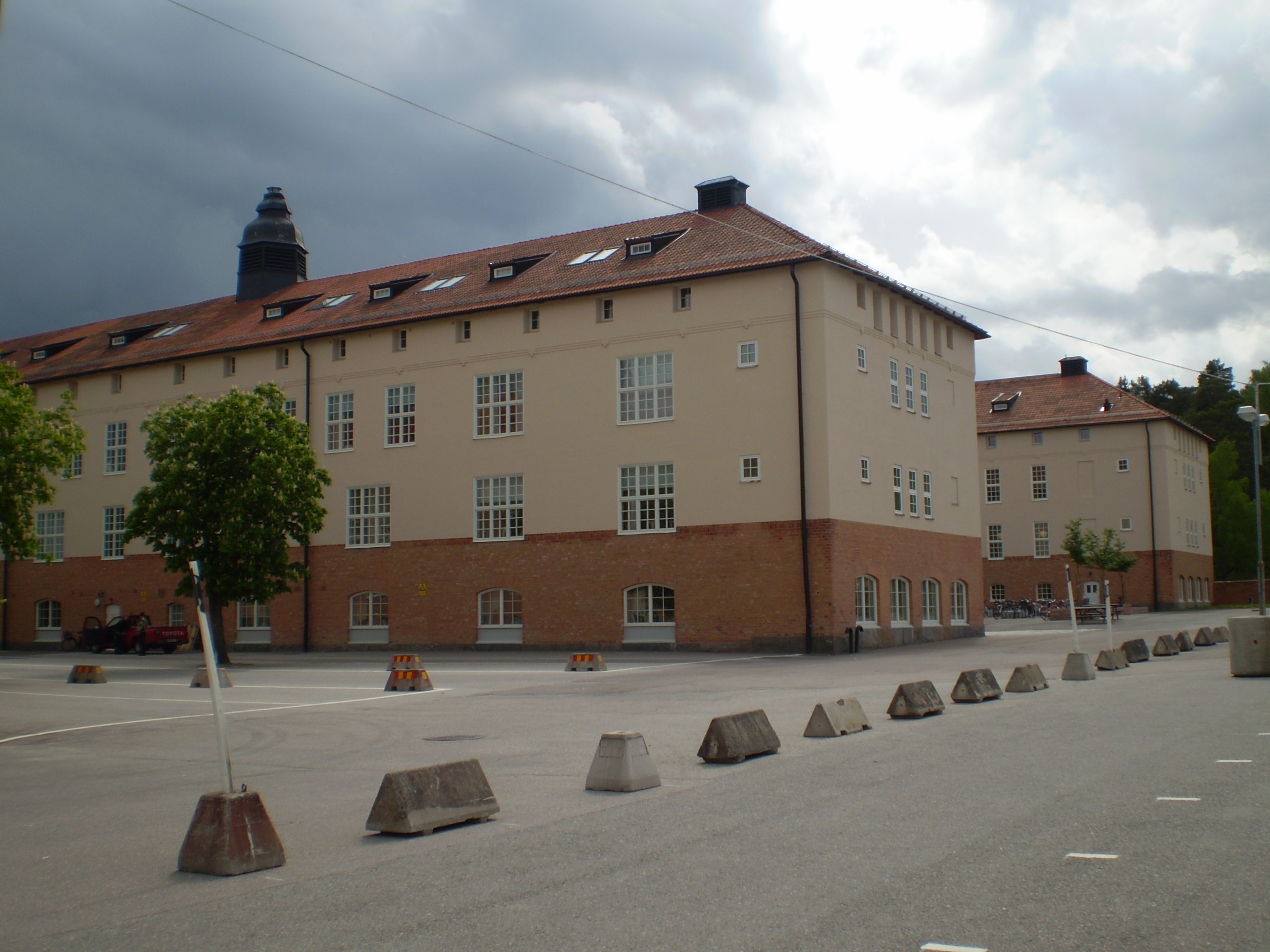 Kasernbyggnad vid Södermanlands regemente